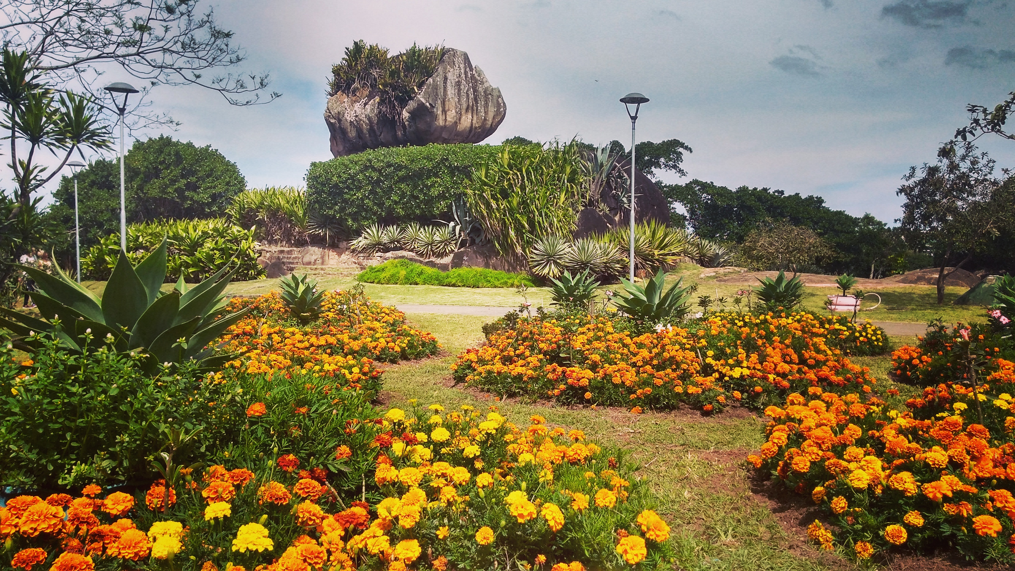 Parque Municipal Pedra da Cebola, Vitória, ES - Brasil